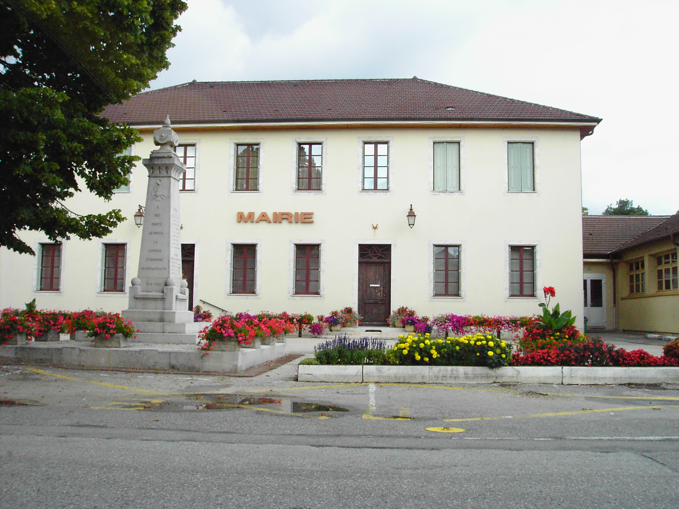 mairie d'Izernore (Ain)